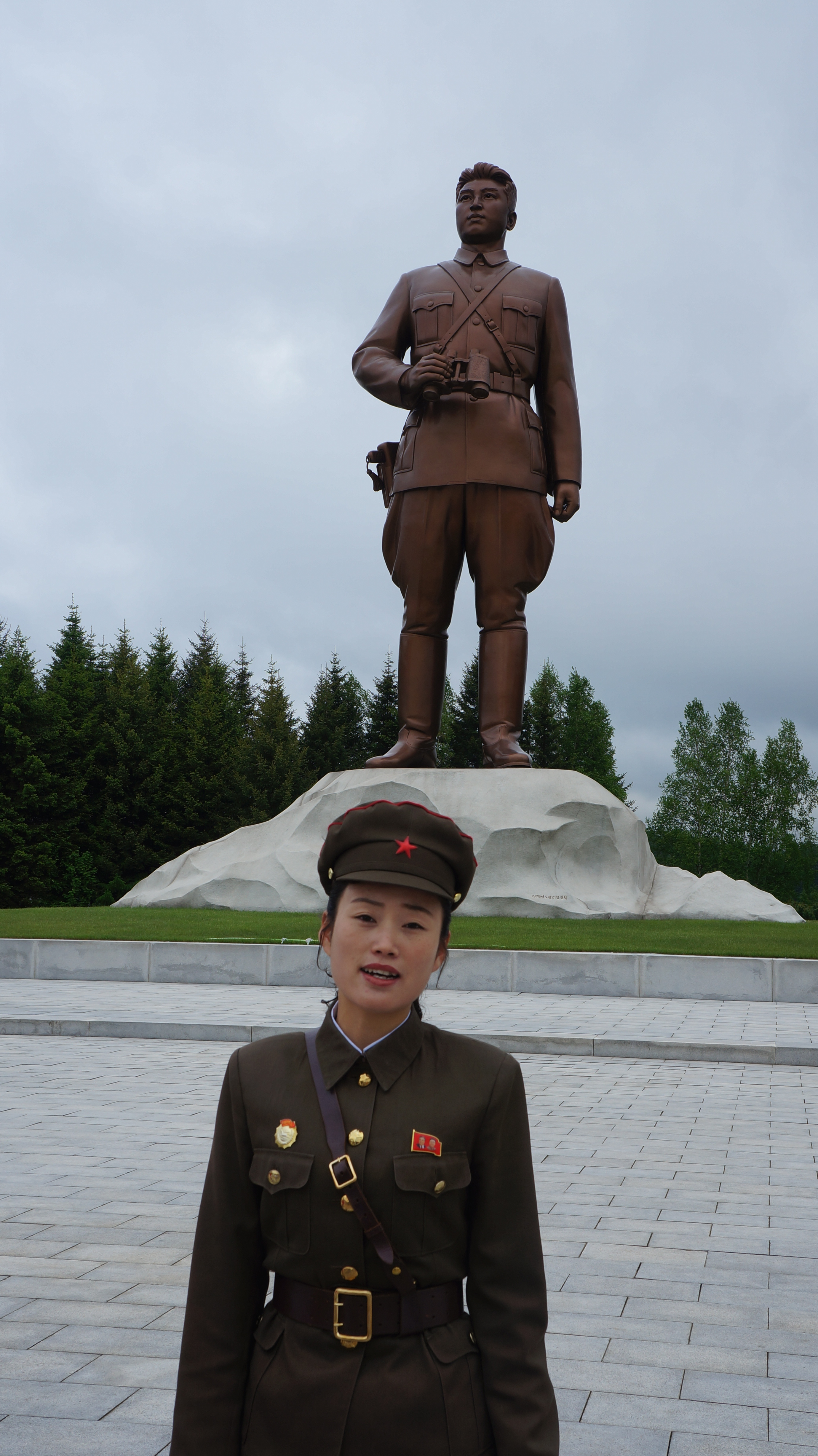 Grand Monument on Lake Samji